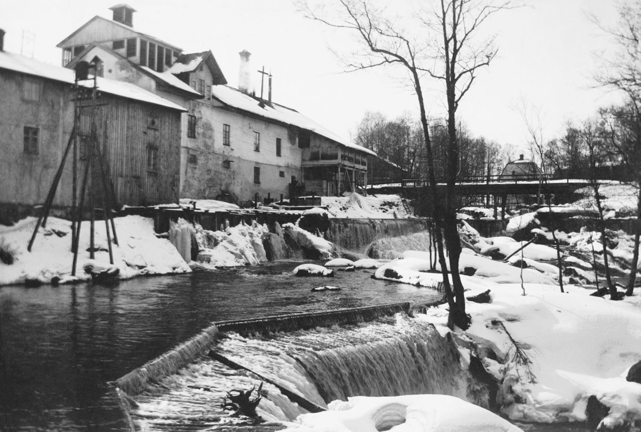 DIG8931. Ludvika bruk och kraftverk. Vintermotiv från nedre forsen. Fotografiet är skänkt till Tekniska museet från Svenska Turistföreningen.